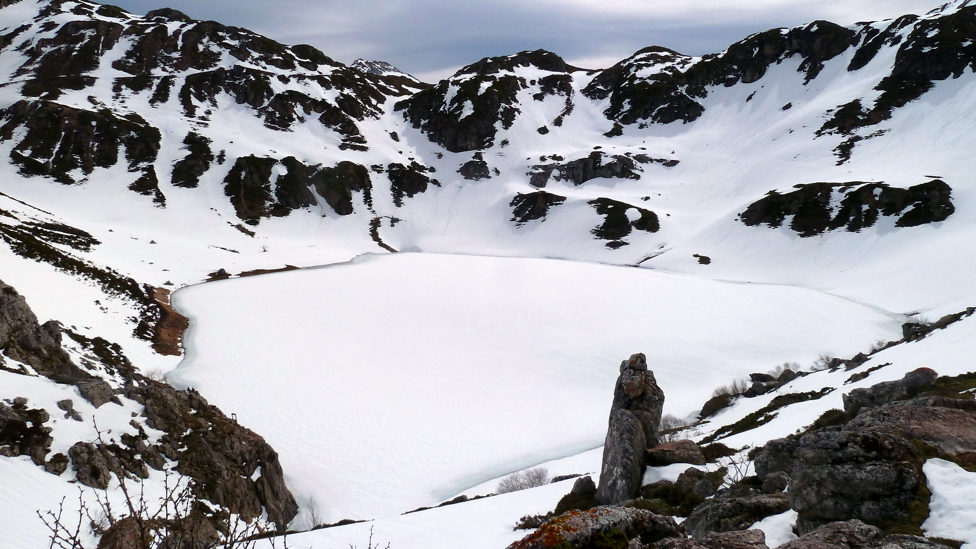 Lago de la Cueva nevado This is a photography of a Site of Community Importance in Spain with the ID: ES0000054. Natura2000 entry, EEA entry